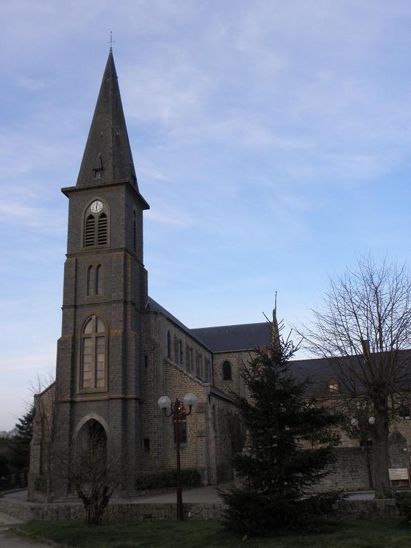 Église Saint-Martin et Saint-Samson de Bonnemain (35).